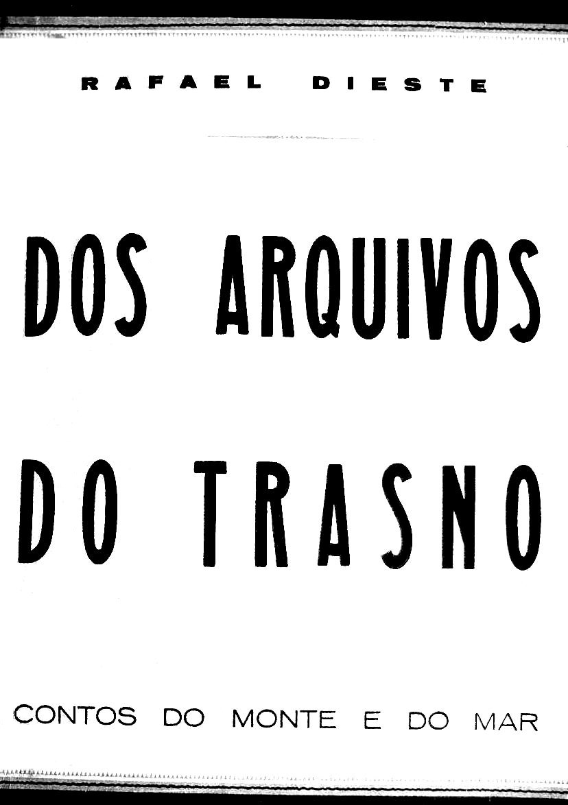 Dos arquivos do trasno. Contos do Monte e do mar